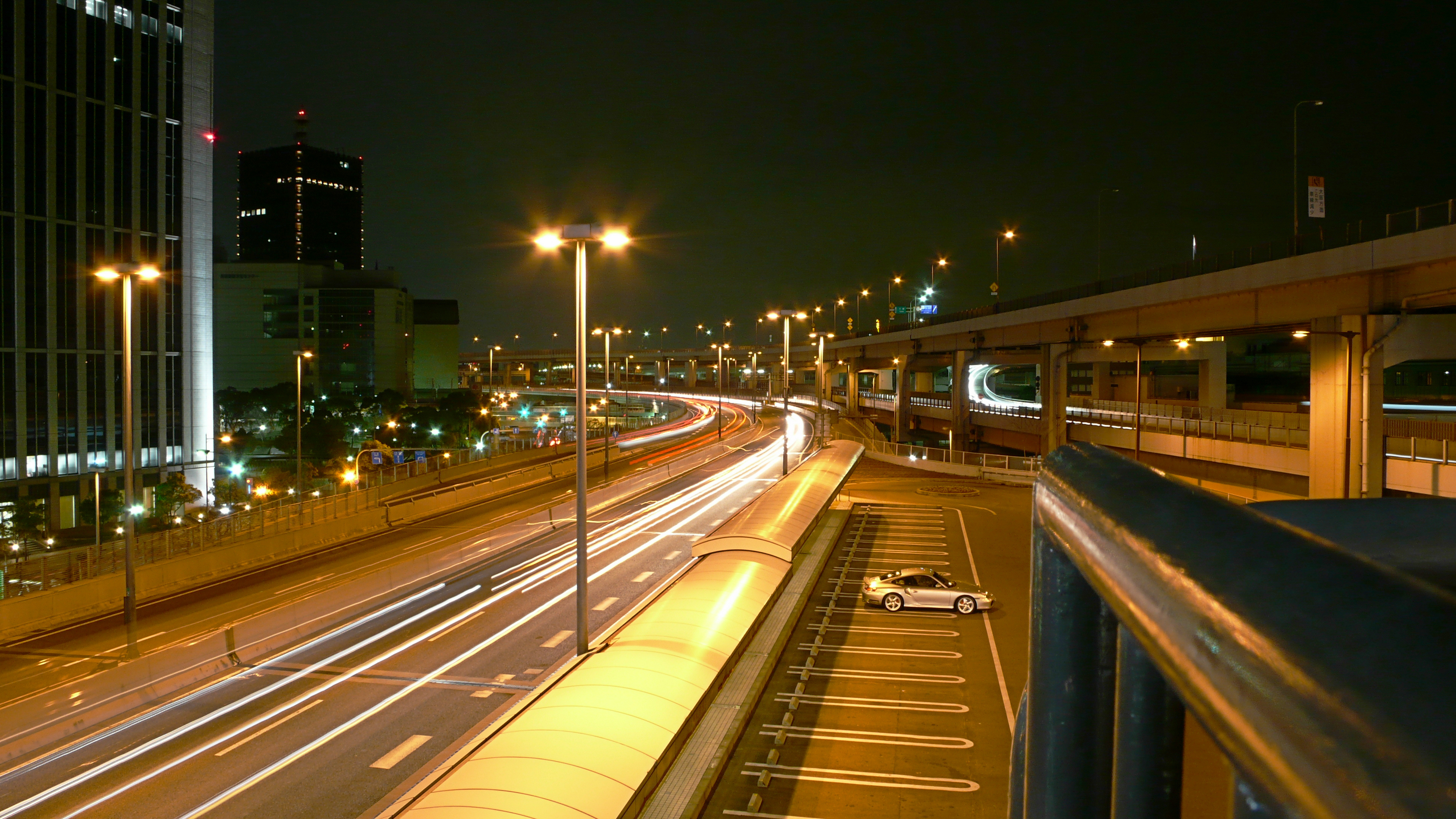 阪神高速３号神戸線・京橋パーキングエリア